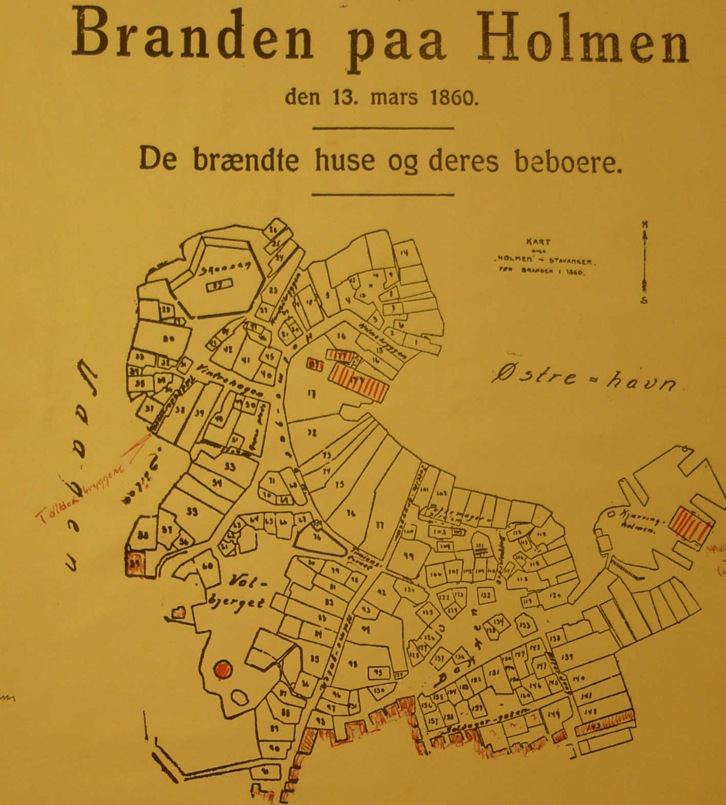 Hentet fra avisa Stavangeren 16.2.1923. Er også tidligere publisert en rekke steder.